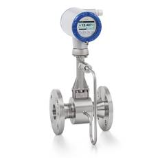 Конструкция вихревого расходомера